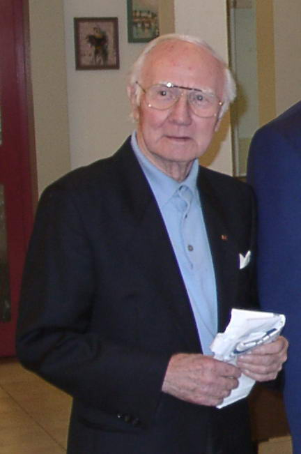 Erwin Lehn in Stuttgart-Untertürkheim